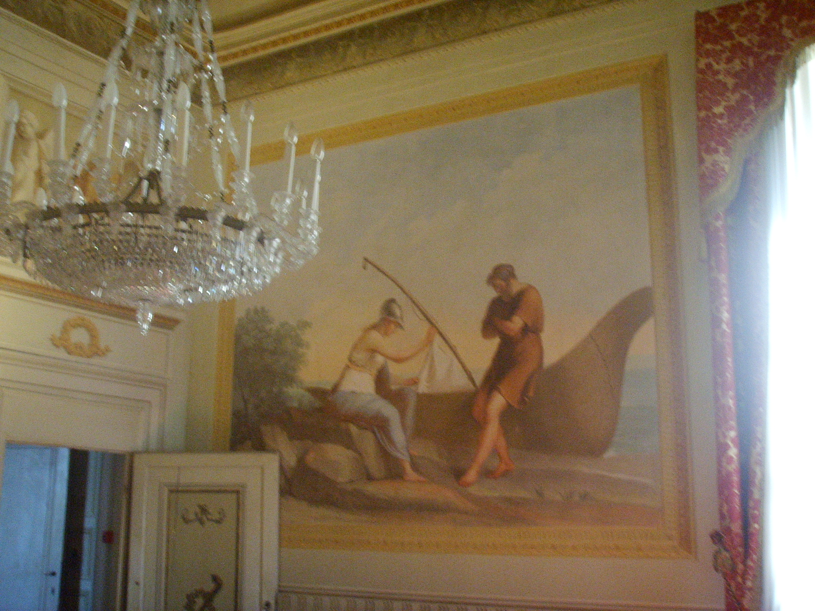 Villa medicea di Poggio a Caiano, inside entrance hall on the first floor in Poggio a Caiano, Italy